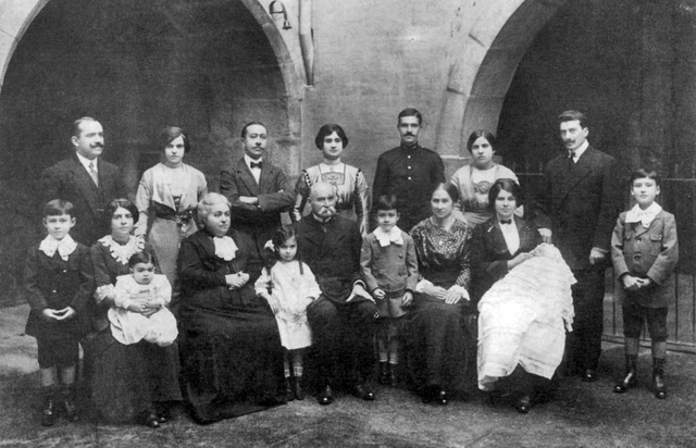 Retrato de Família